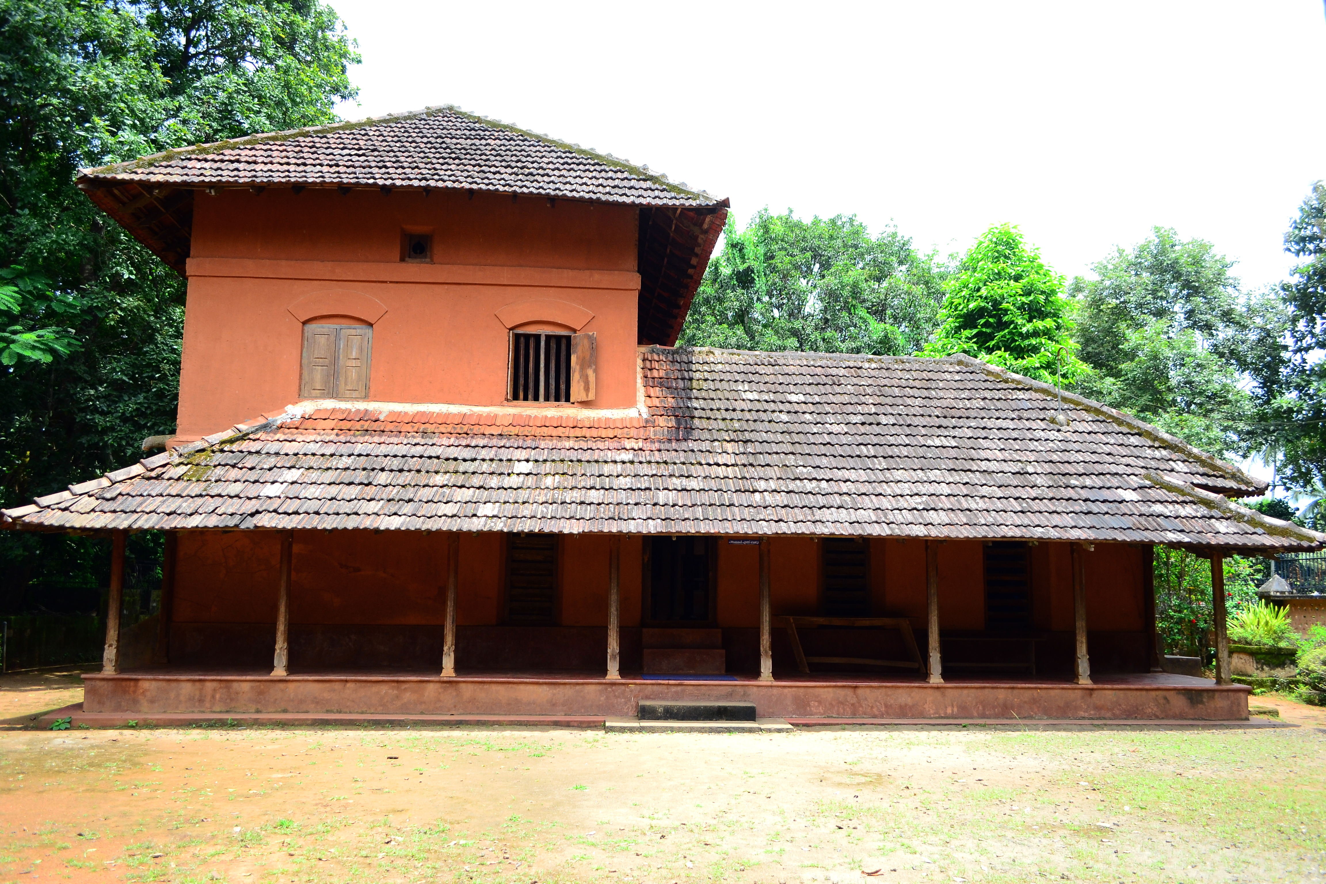 പാലക്കാട്‌ ലക്കിടി കിള്ളിക്കുറിശ്ശിമംഗലത്തെ, കുഞ്ചന്‍ നമ്പ്യാര്‍ ജനിച്ചതെന്ന് കരുതപ്പെടുന്ന കലക്കത്ത് ഭവനം. ഇപ്പോഴിത് പുരാവസ്തു വകുപ്പിന്റെ കീഴിലാണ്.